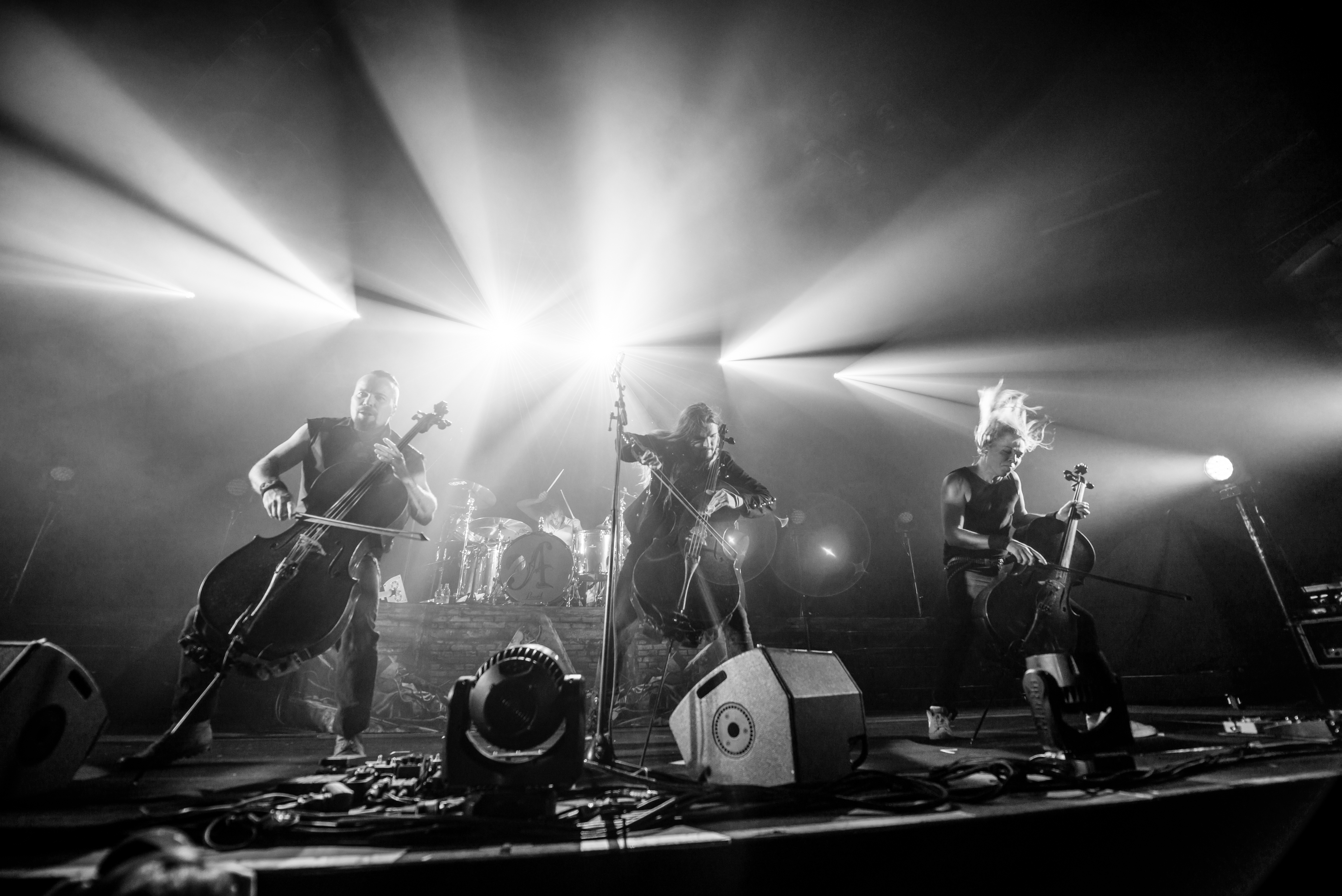 'Apocalyptica Shadowmaker Tour 2015 Köln'